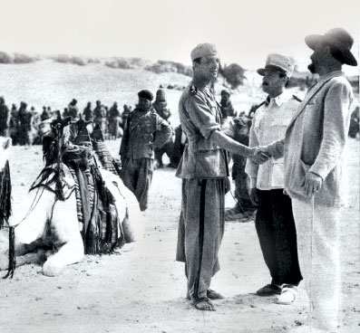 Rapporto ufficiali dello "squadrone bianco" (Genina 1936)